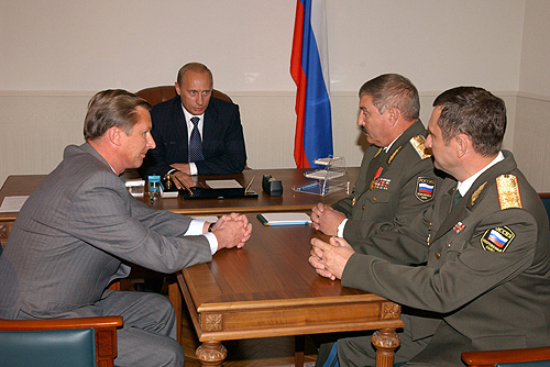 СОЧИ, БОЧАРОВ РУЧЕЙ. Рабочая встреча Президента Российской Федерации Владимира Путина с Министром обороны Сергеем Ивановым, генерал-полковником Георгием Шпаком и командующим Воздушно-десантными войсками России генерал-лейтенантом Александром Колмаковым.